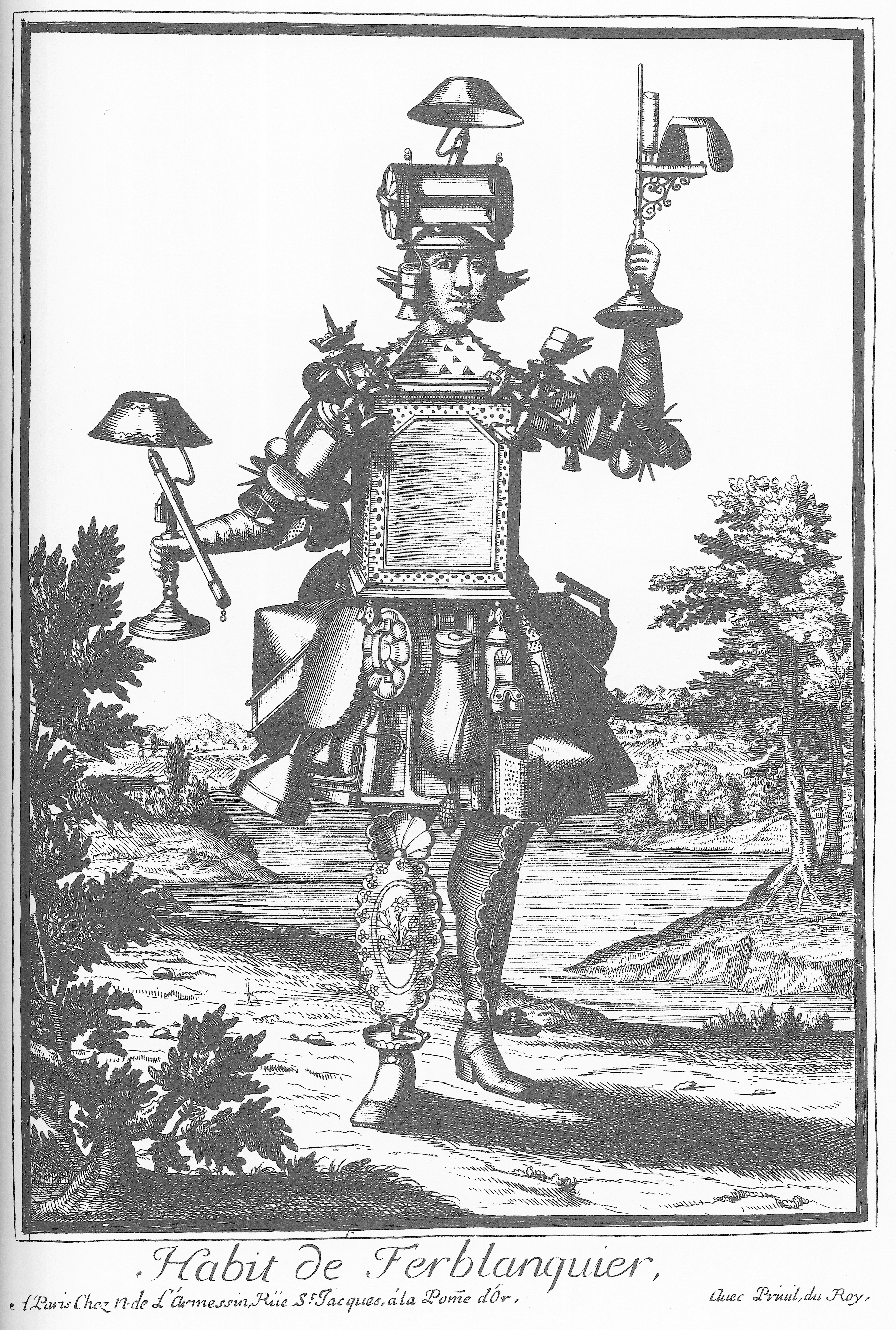 Gravure attribuée à Nicolas II de Larmessin, réalisée probablement au XVIIe siècle.